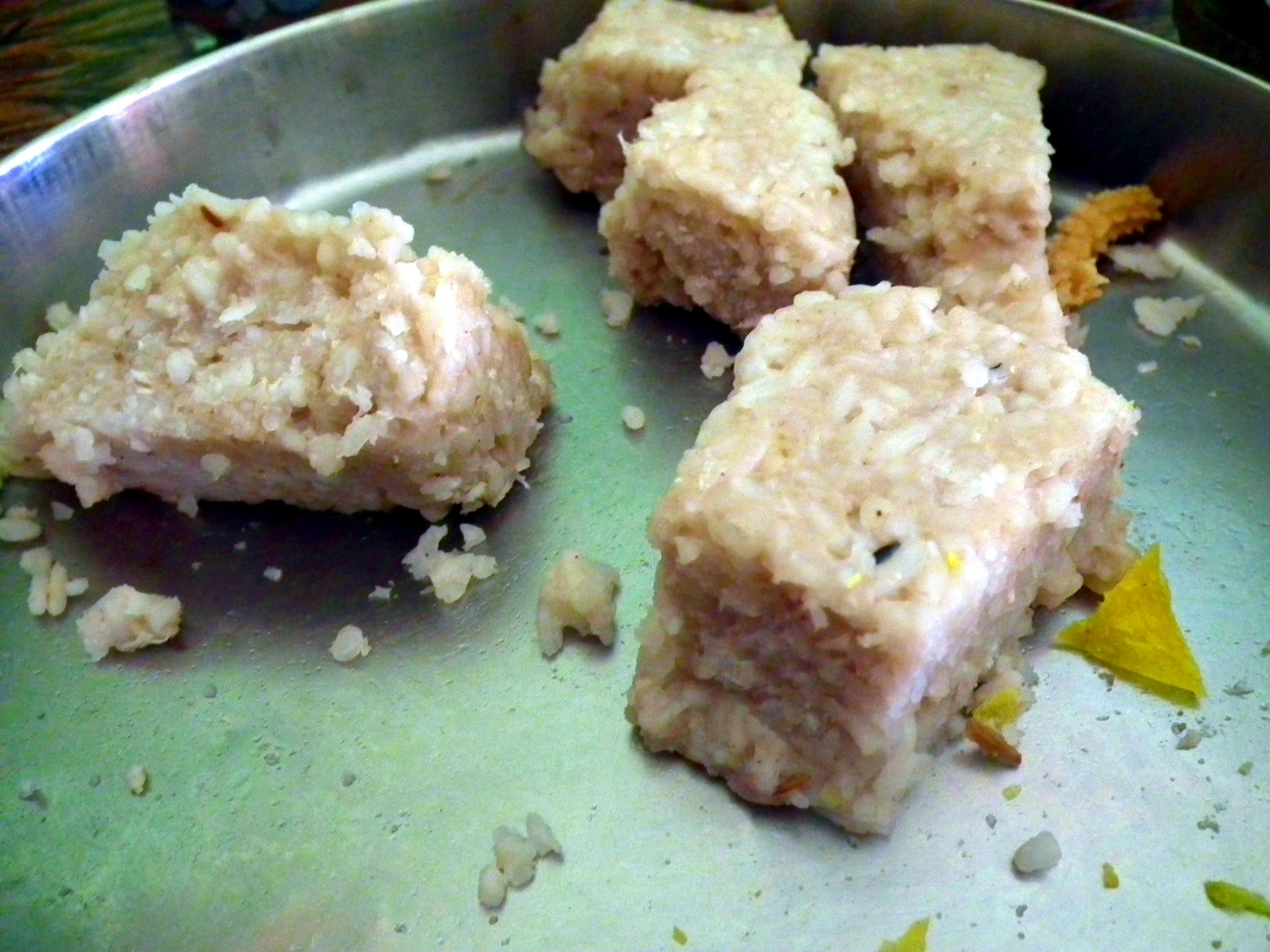 Vishu is also a day of feasting, wherein the food consist of roughly equal proportions of salty, sweet, sour and bitter items. Feast items include Veppampoorasam (a bitter preparation of neem) and Mampazhapachadi (a sour mango soup). വിഷുവിനു പ്രാതലിന് ചിലയിടങ്ങളിൽ വിഷുക്കട്ട എന്ന വിഭവവും കാണാറുണ്ട്‌. നാളികേരപ്പാലിൽ പുന്നെല്ലിന്റെ അരി വേവിച്ച് ജീരകം ചേർത്ത് വറ്റിച്ചാണ് വിഷുക്കട്ട ഉണ്ടാക്കുന്നത്‌. വിഷുക്കട്ടക്ക് മധുരമോ ഉപ്പോ ഉണ്ടാവാറില്ല. ശർക്കര പാനിയോ, മത്തനും, പയറും കൊണ്ടുള്ള കറിയോ ഉപയോഗിച്ചായിരിക്കും ഇത് കഴിക്കുക. തൃശ്ശൂരിലെ വിഷുവിന് വിഷുക്കട്ട നിർബന്ധമാണ്